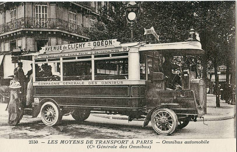 Carte postale ancienne éditée par ES, collection Les moyens de transport à Paris, N°2150Omnibus automobile (Compagnie générale des omnibus) Autobus - ligne H (prototype Schneider)